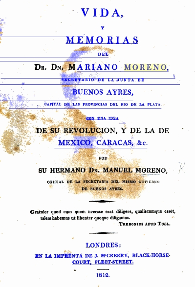 Caratula libro Vida y Memoria Mariano Moreno editada por Manuel Moreno en Londres en 1812.